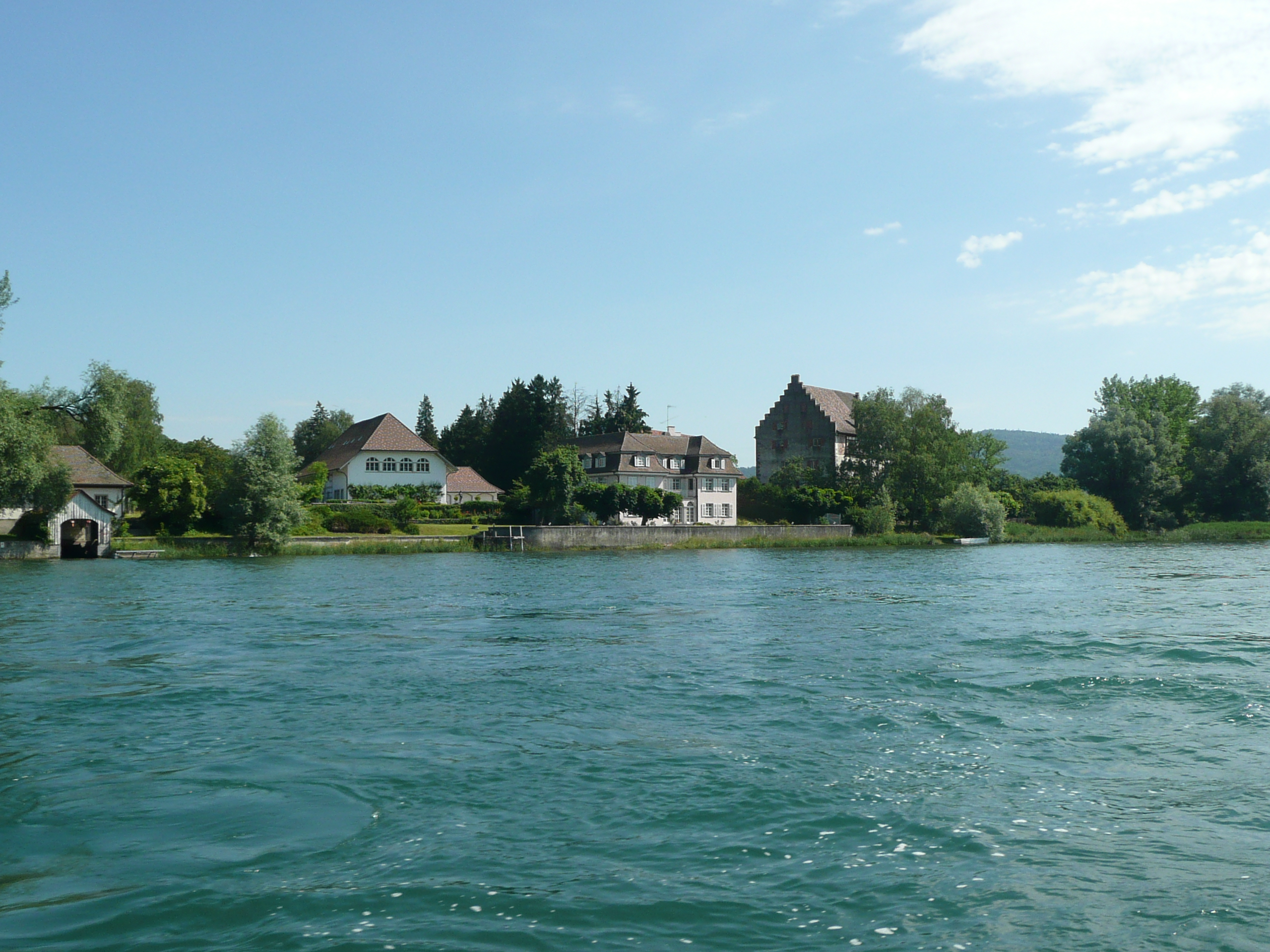 Bibermühle